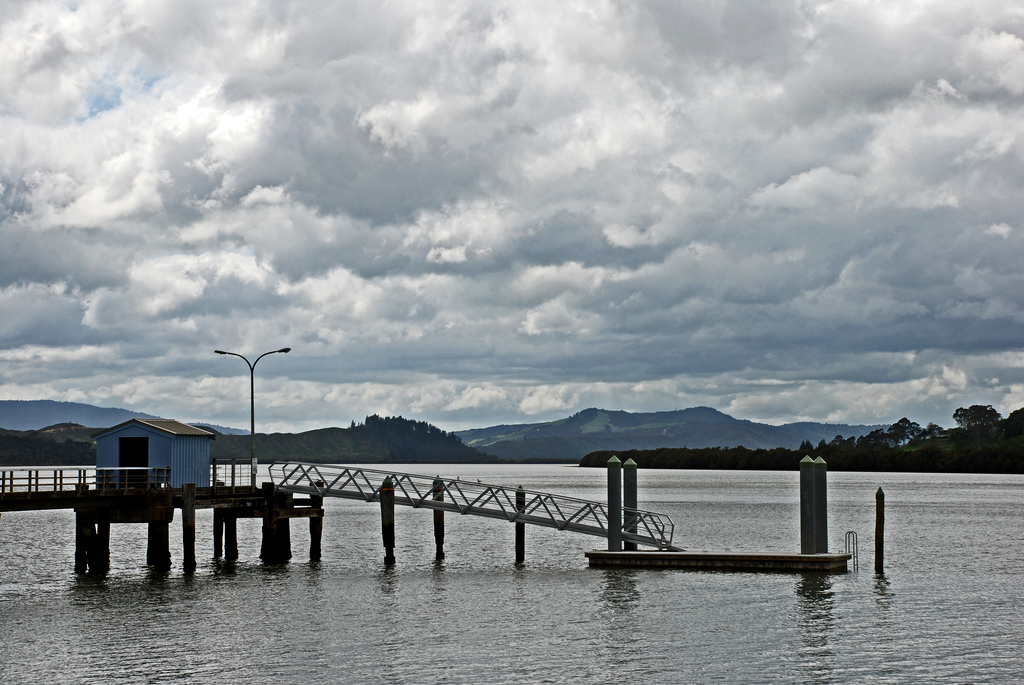 Kohukohu Wharf, Northland, New Zealand